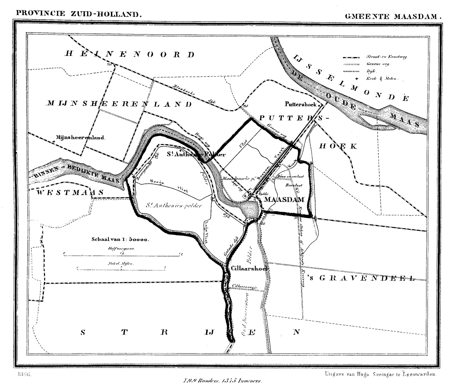 Kaart van Maasdam uit Gemeente Atlas van Nederland, J. Kuyper 1865-1870, Uitgave Hugo Suringar Leeuwarden.